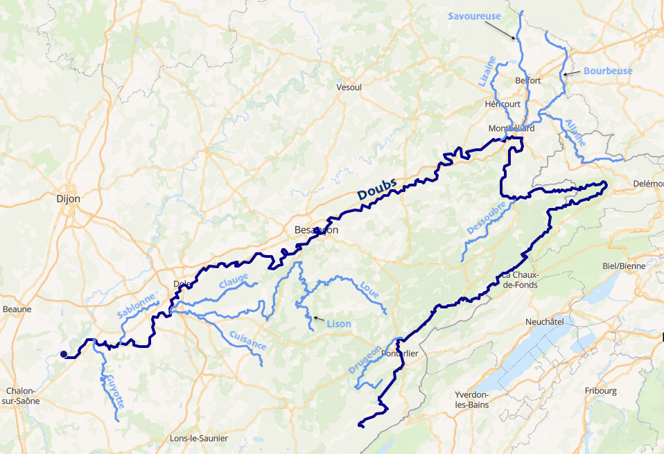 carte réalisée sur umap This map may be incomplete, and may contain errors. Don't rely solely on it for navigation.